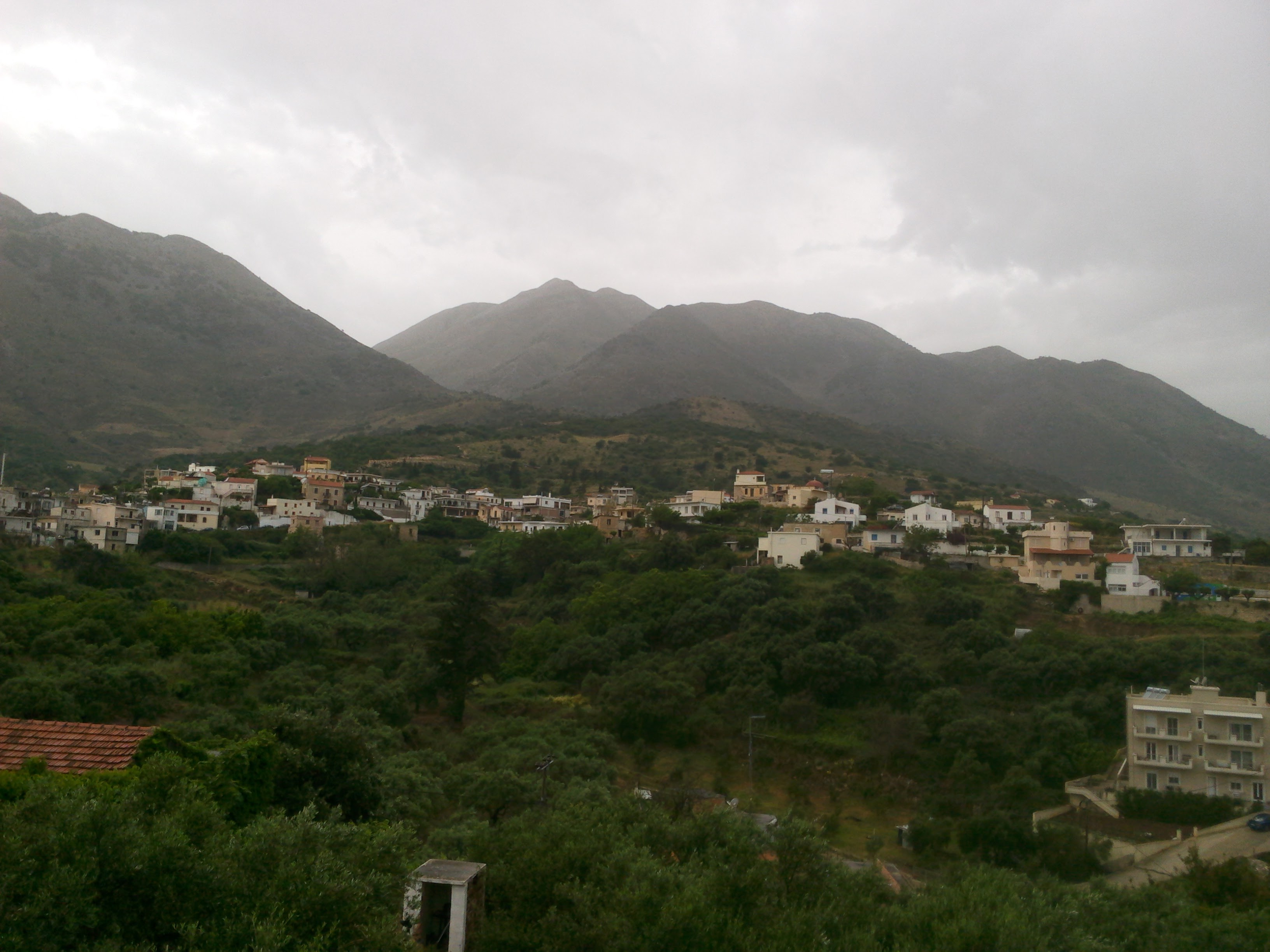 Άποψη του Χωριού του Κουρνά